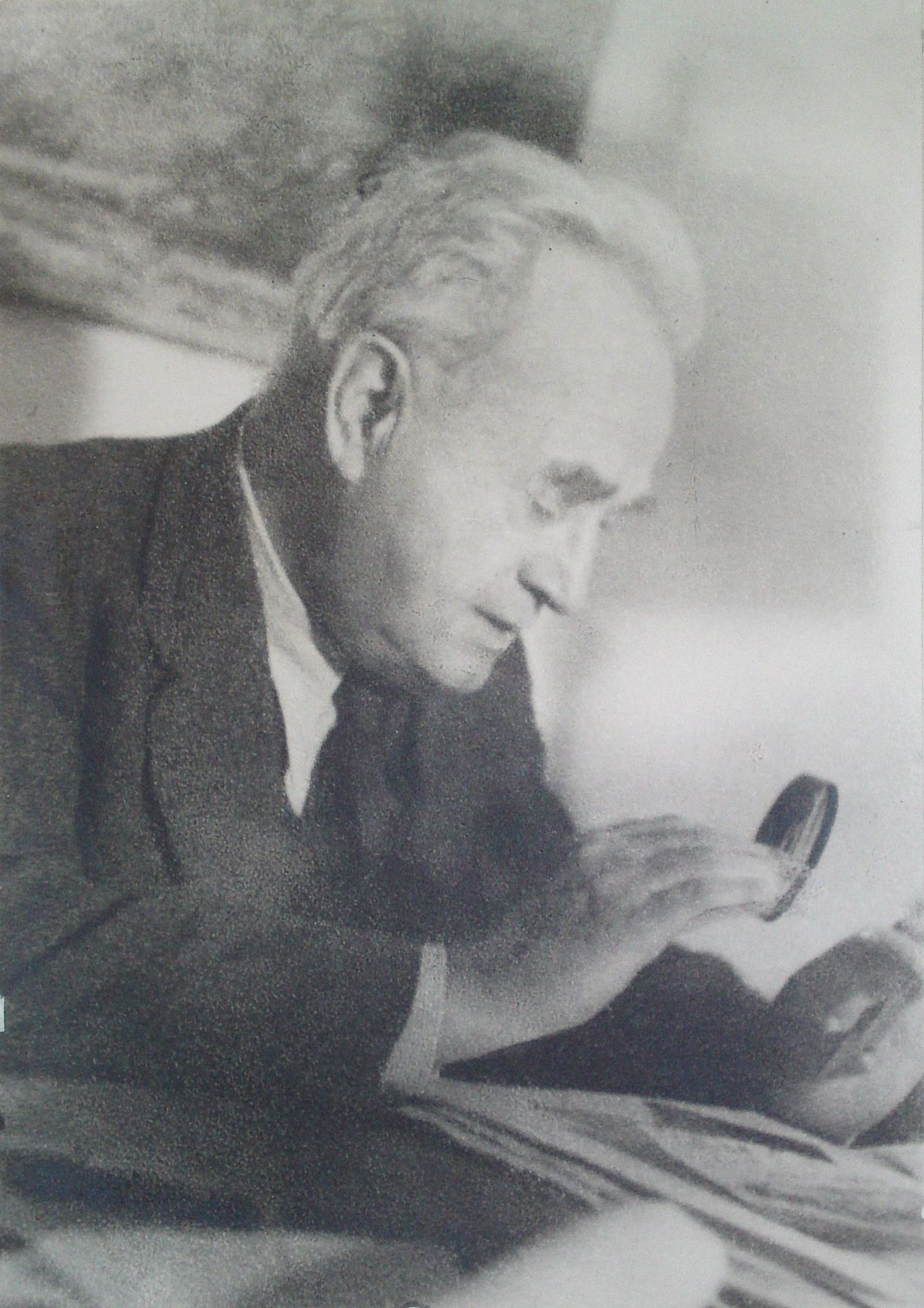 Portrait Carl Zitzmann